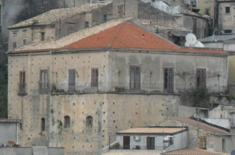 Gioiosa Jonica Palazzo Naymo Pellicano Spina